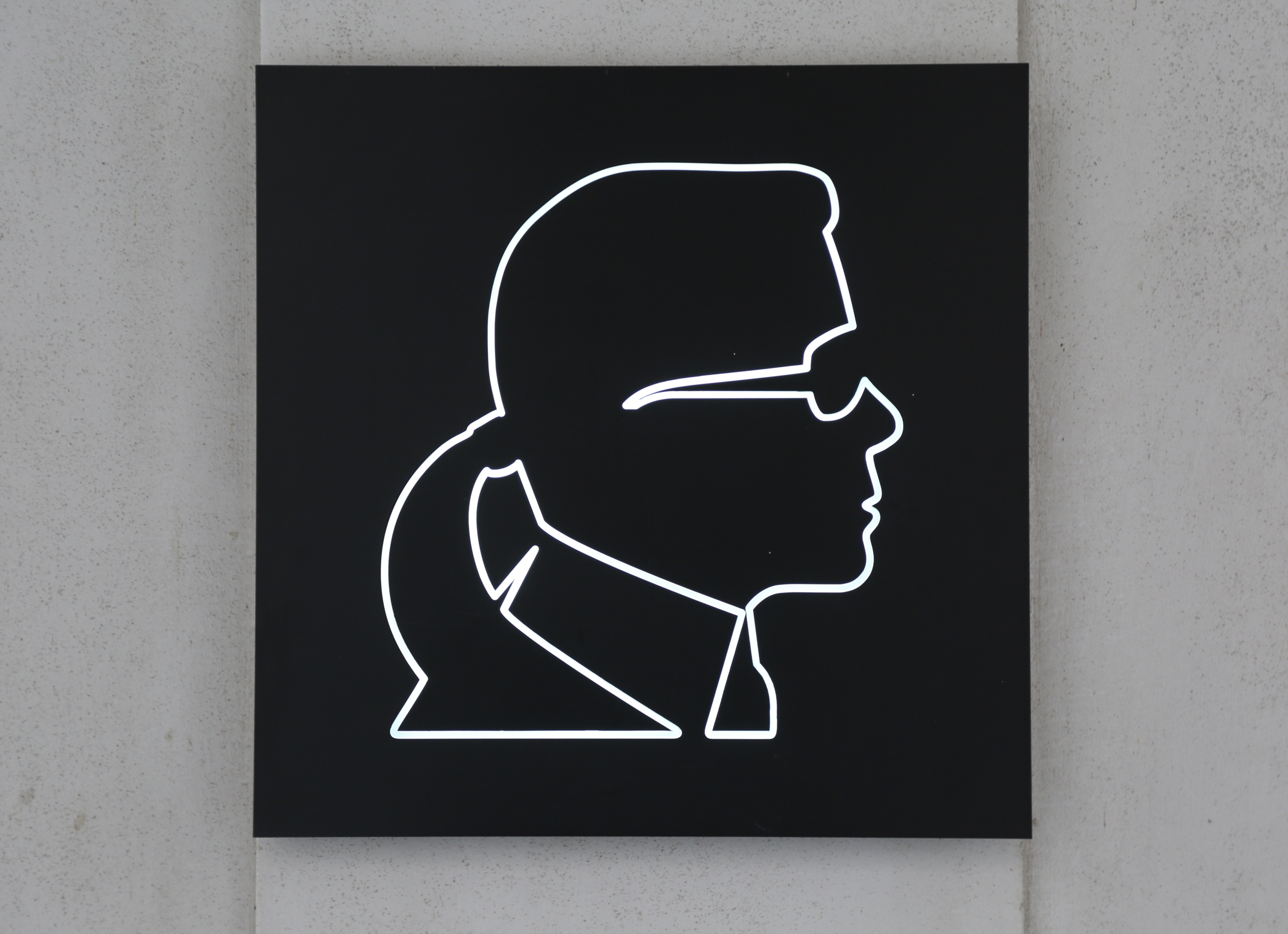 Logo der Lagerfeld-Läden an der Fassade der Münchner Filiale